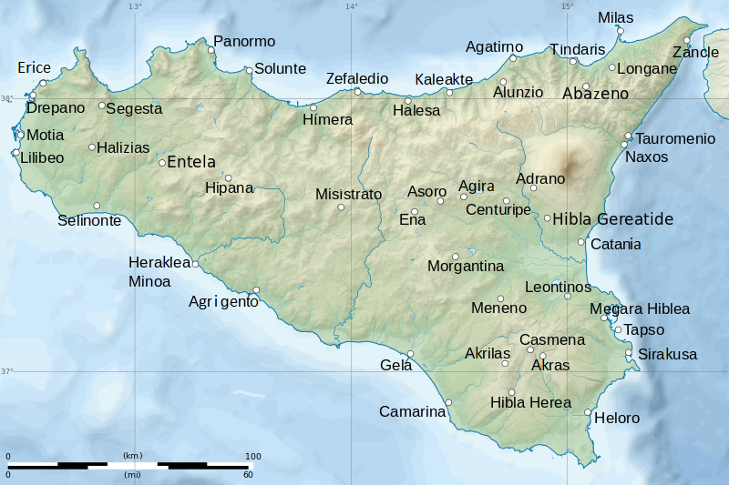 Antzinako Siziiako hiriak